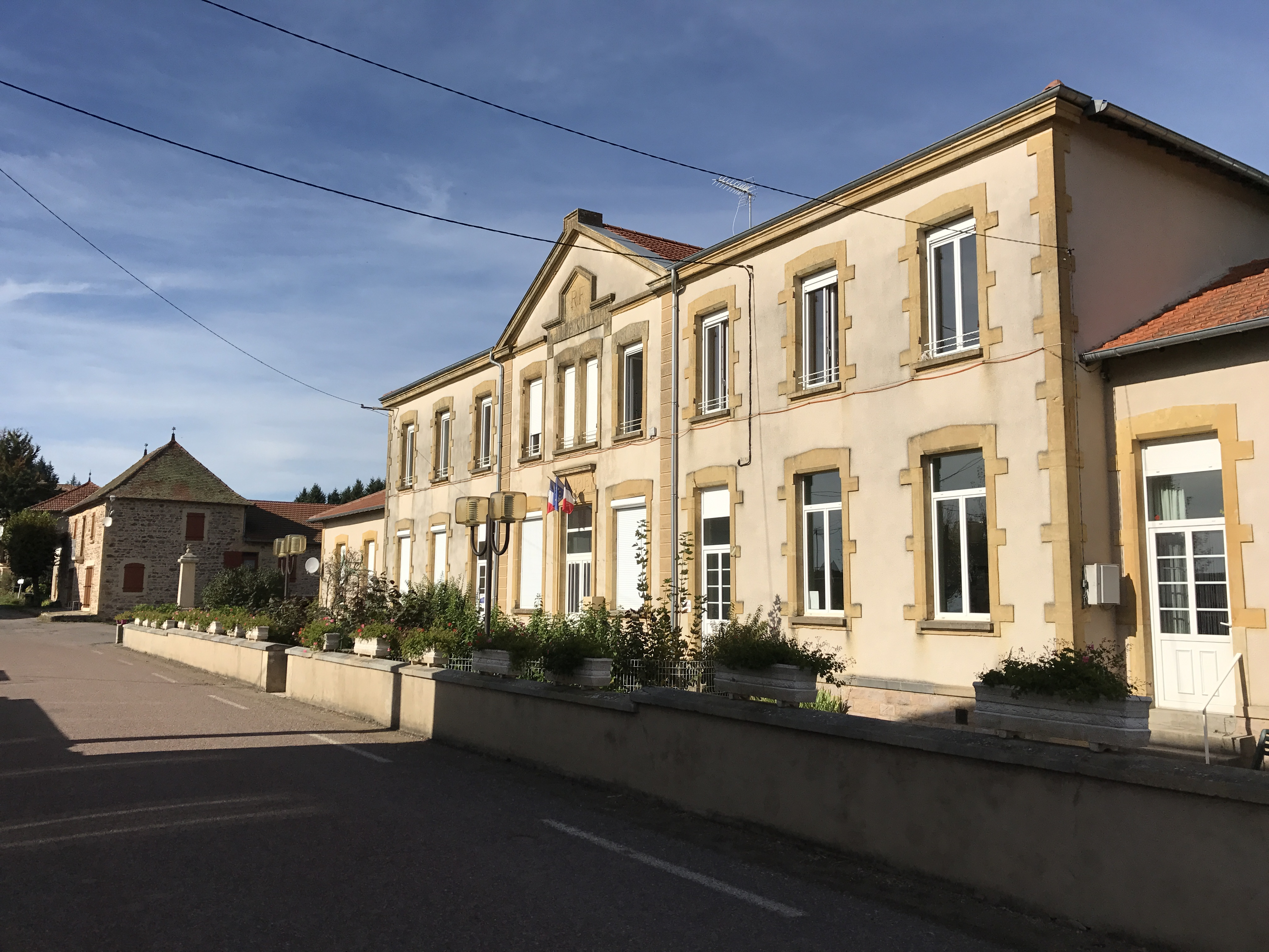 Mairie de Saint-Germain-la-Montagne en octobre 2017.